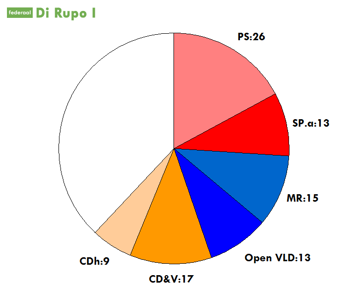 zetelverdeling in de kamer voor de meerderheid van Di Rupo I